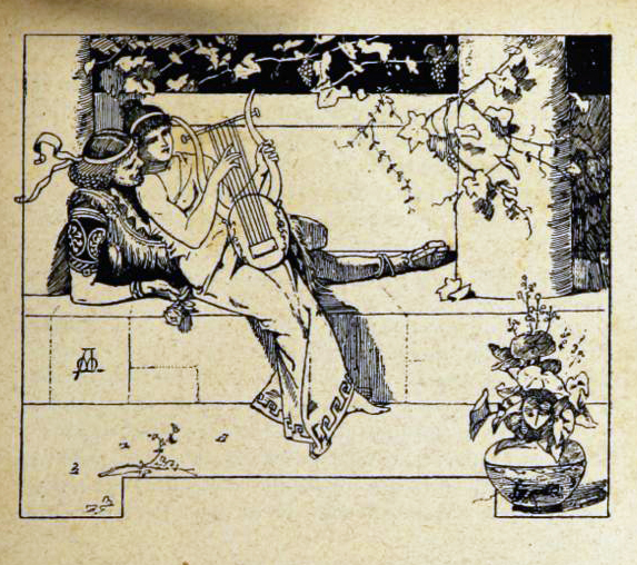 Ilustración de La hija del rey de Egipto.